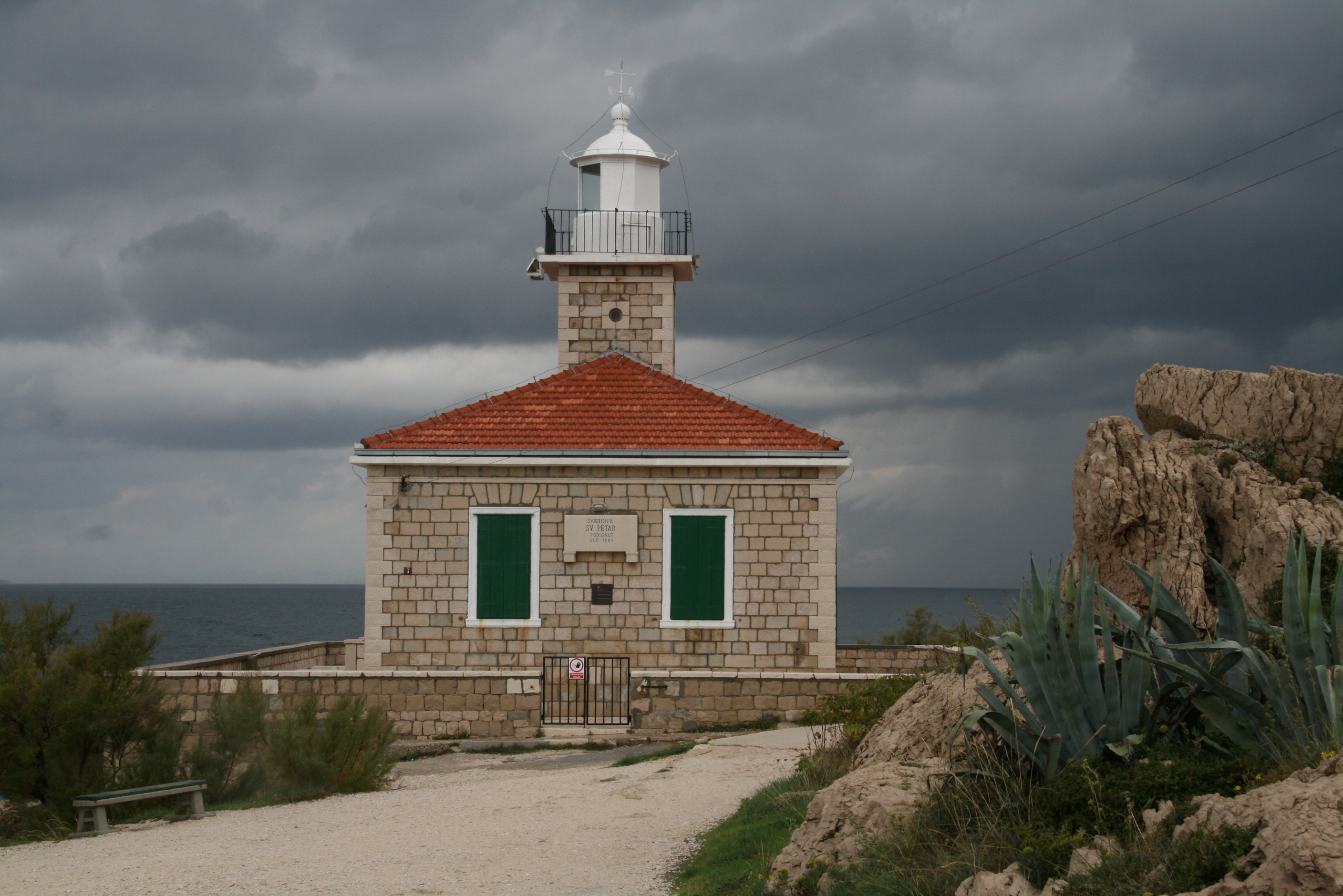 Leuchtturm in Makarska